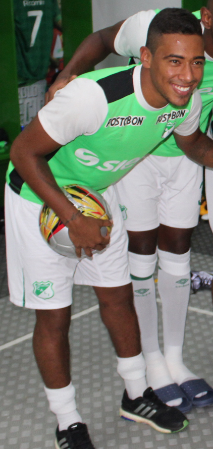 Harrison Mojica jugador canterano del Deportivo Cali